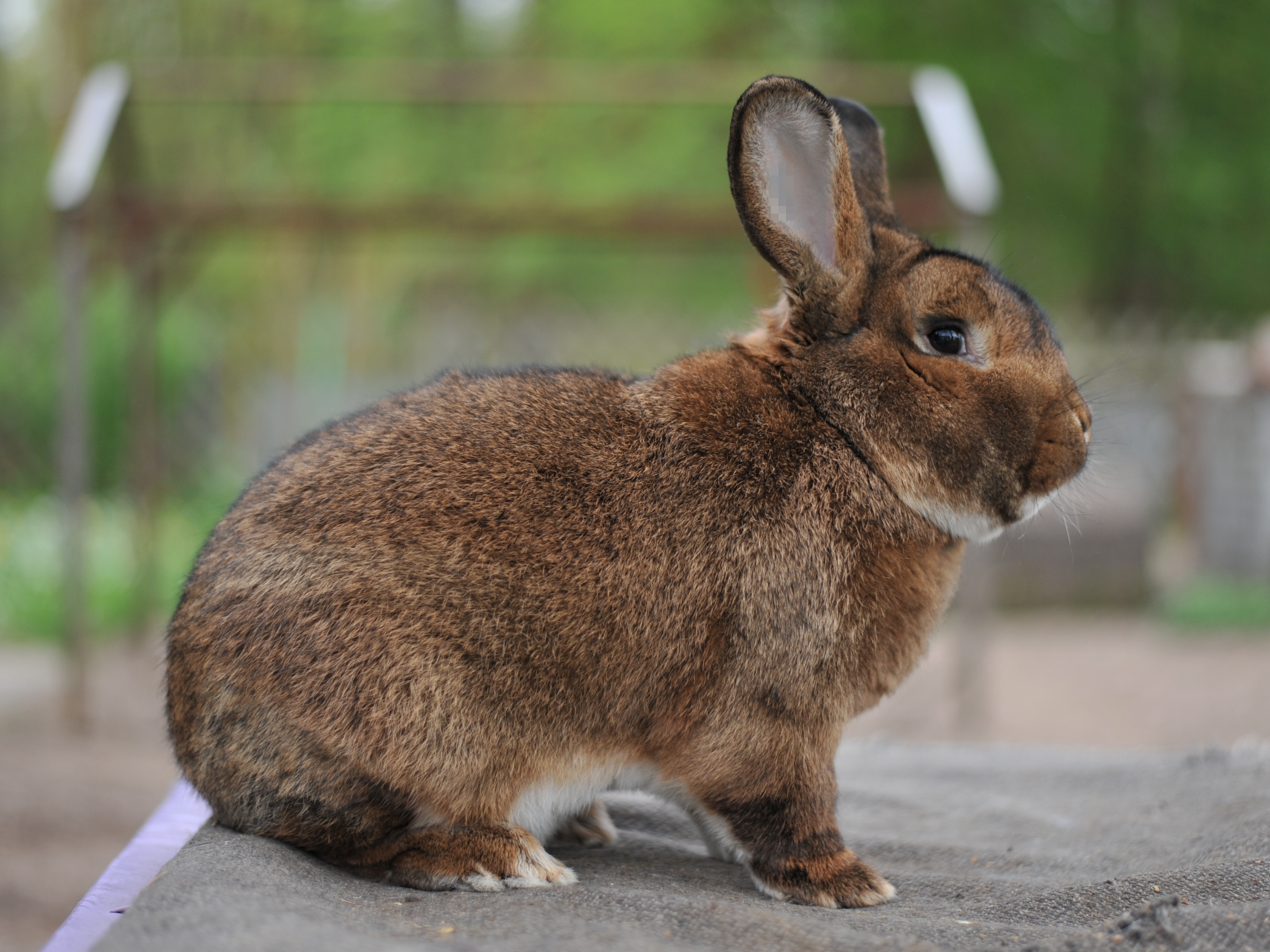 Rassekaninchen Wiener wildgrau, männlich